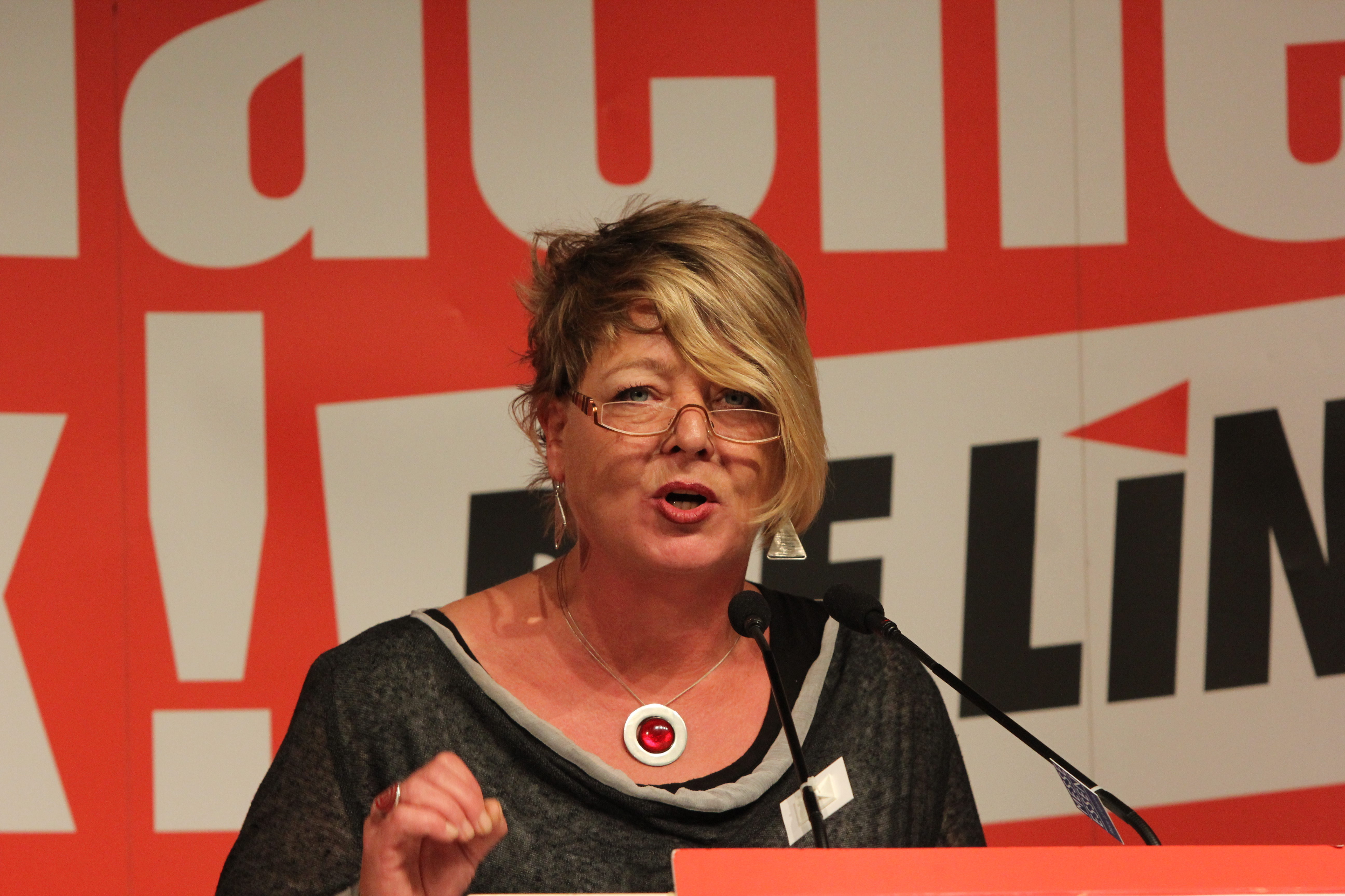 DIE LINKE. NRW Ingrid Remmers. Foto: Niels Holger Schmidt